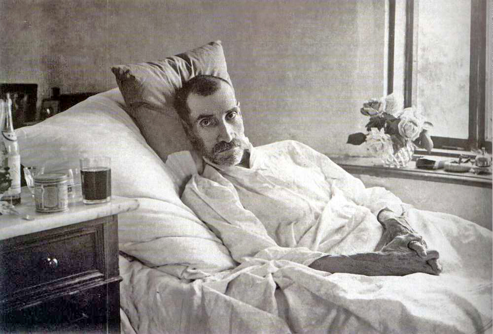 Александр Грин на смертном одре. Старый Крым. 1932